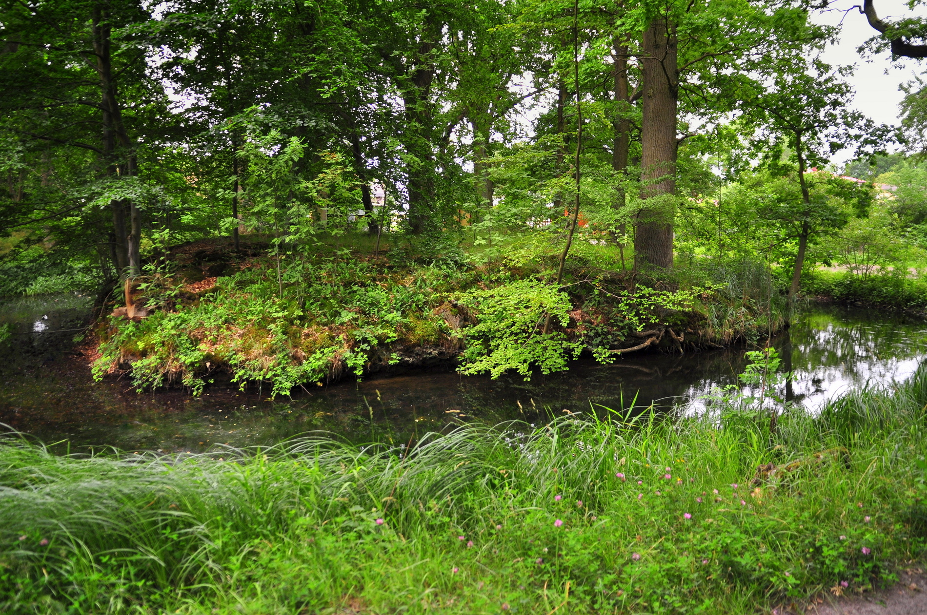 Mielno, ul. Kościelna ( przy ścieżce prowadzącej na plażę ). Pozostałość gródka z IX-X wieku